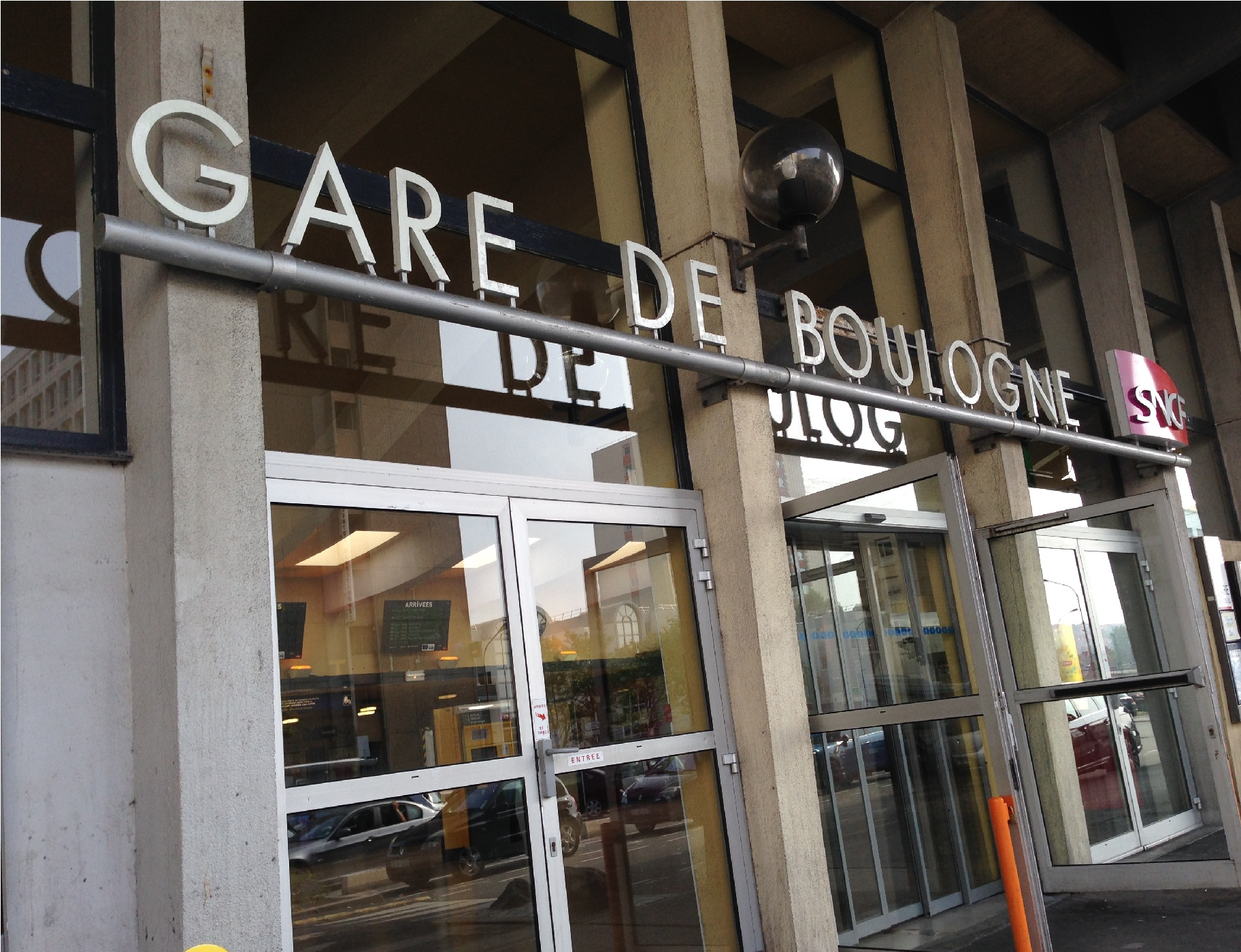 Gare de Boulogne-Ville-2014